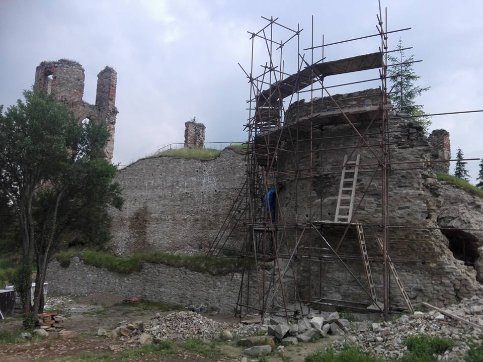 Obnova hradu.